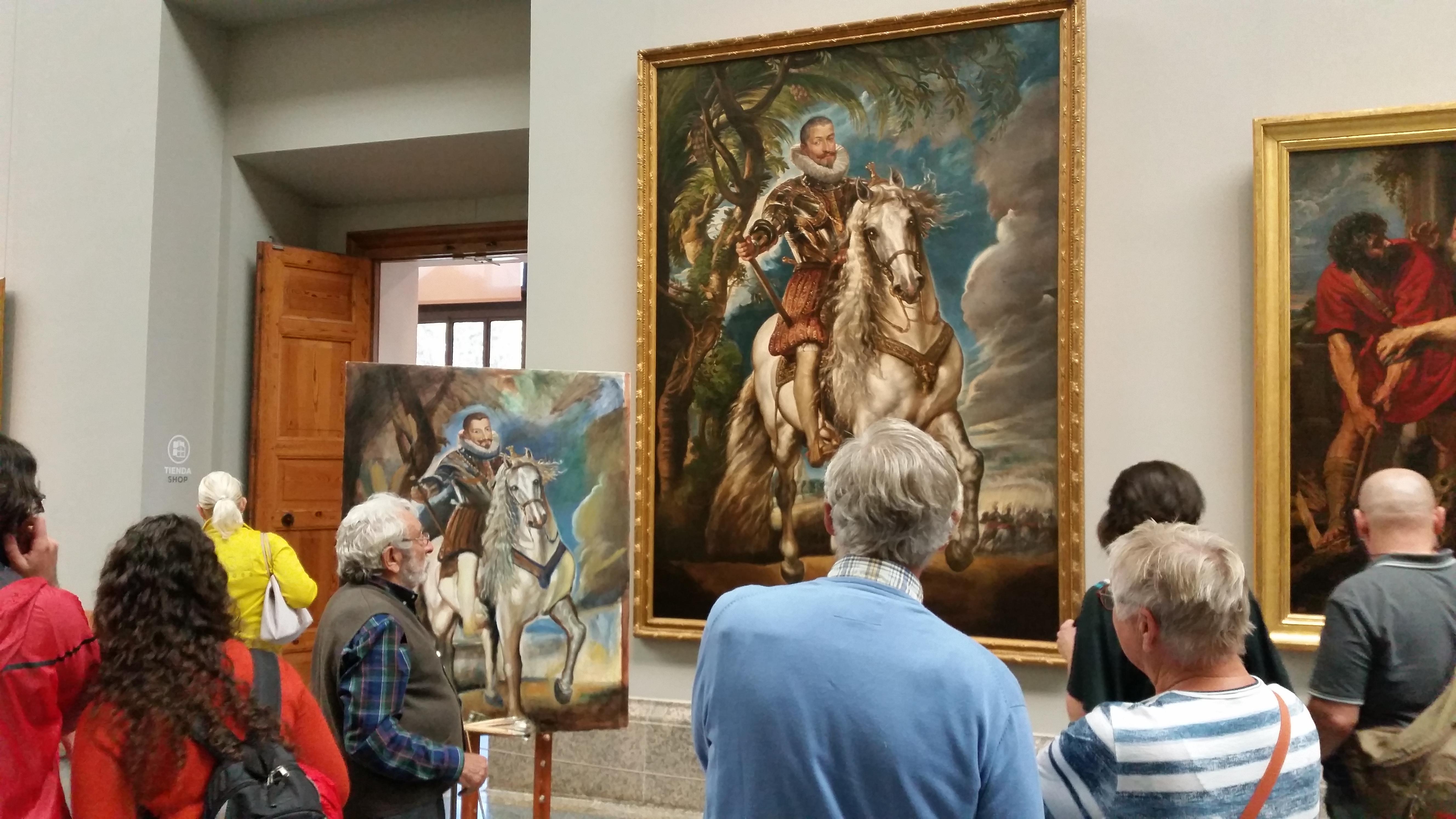 Ángel García de Diego, copista oficial del Museo Nacional del Prado, realizando una copia del retrato ecuestre del Duque de Lerma de Pedro Pablo Rubens, en el propio Museo del Prado, Madrid, España.